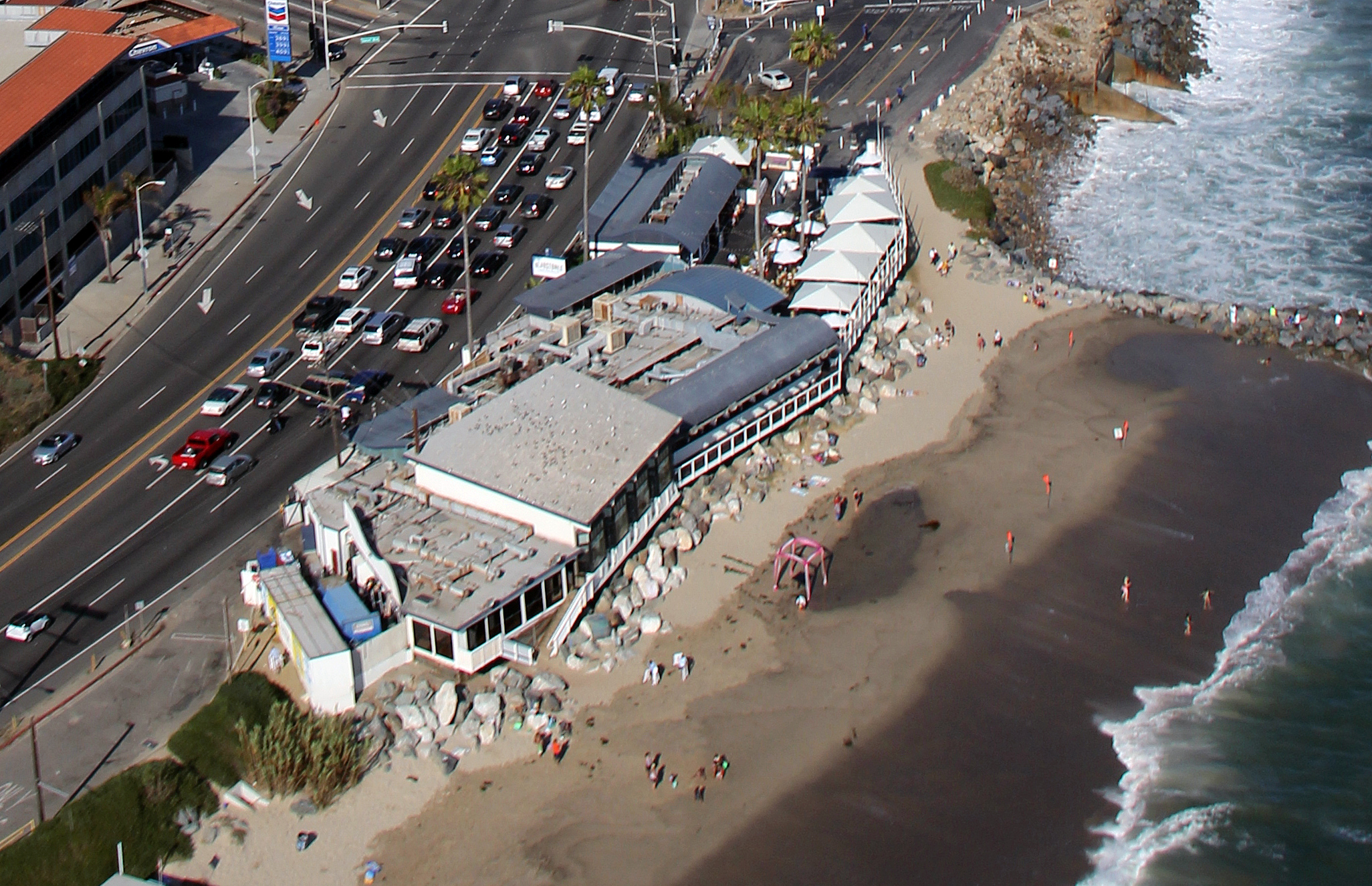 Gladstones Malibu